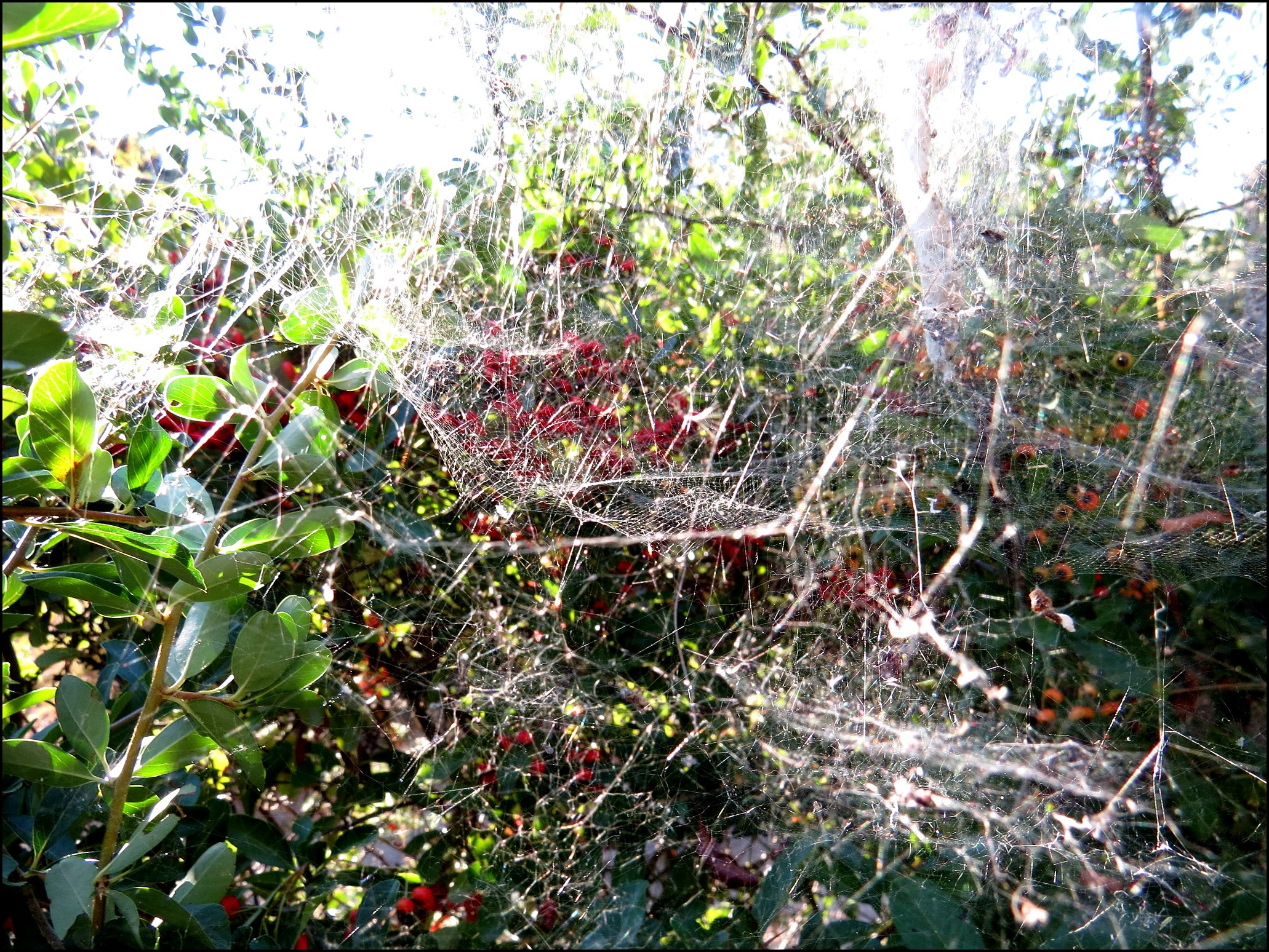 Toile de Cyrtophora : détails de la nappe (dôme) avec ses mailles carrées caractéristiques